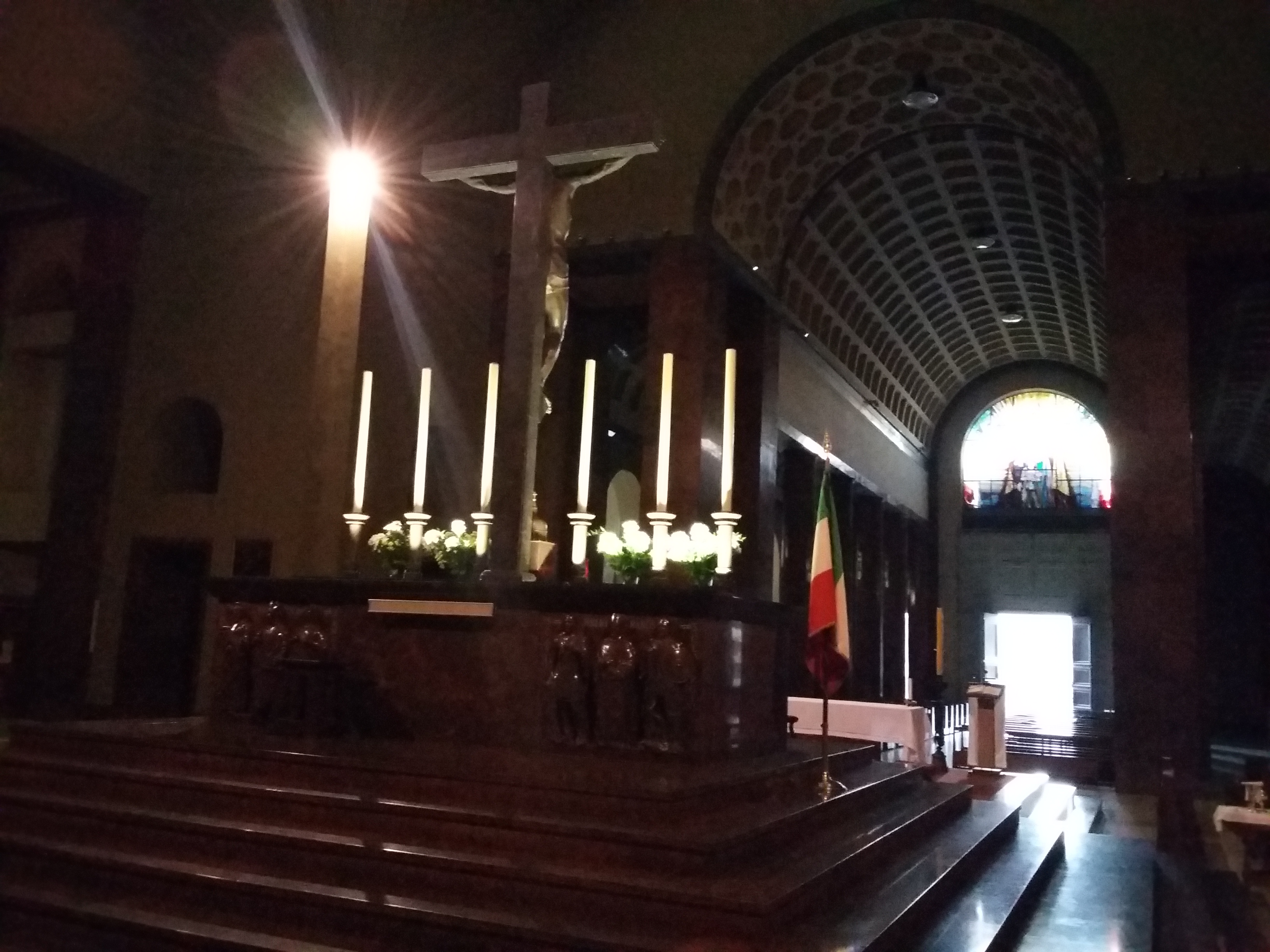 L'altare maggiore e la navata centrale del Tempio Ossario di Udine